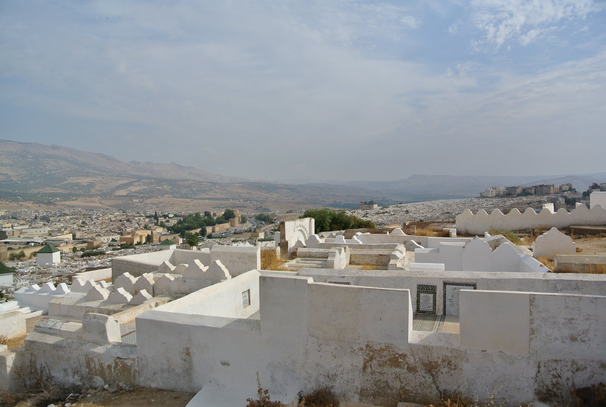 Fes, Morocco